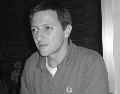 Fotografía del escritor Ignacio Martínez de Pisón.